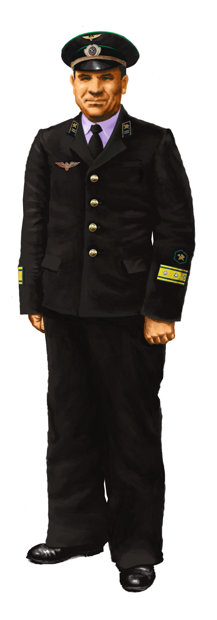 Начальник отдела сигнализации и связи отделения железной дороги (старший начсостав) в форме 1979 г.